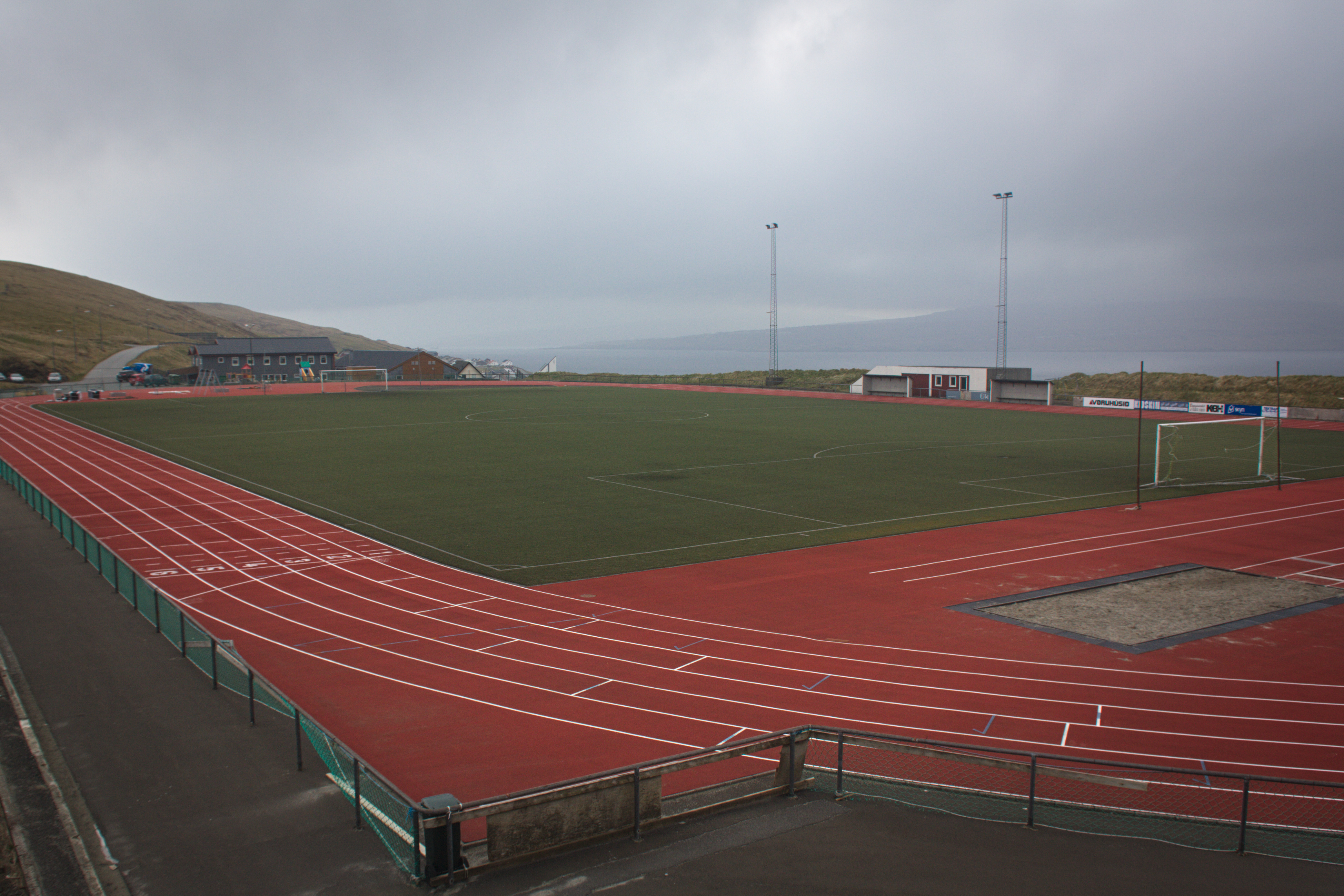 Lilit Svangaskarð – wielofunkcyjny obiekt sportowy w miejscowości Toftir, na Wyspach Owczych.